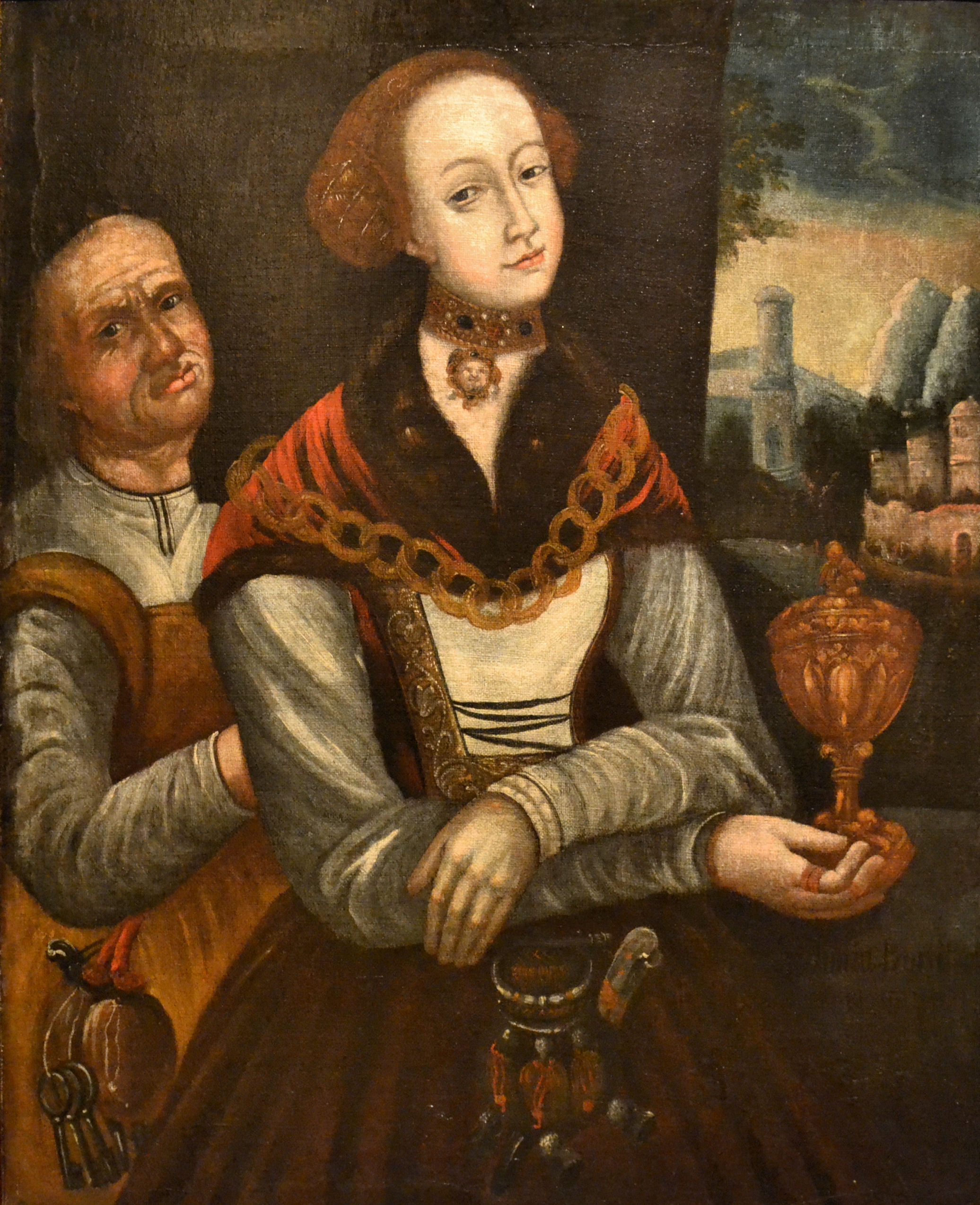 Podwójny portret Sydonii von Borck jako młodej i starej kobiety (autor nieznany, XVIII w.)